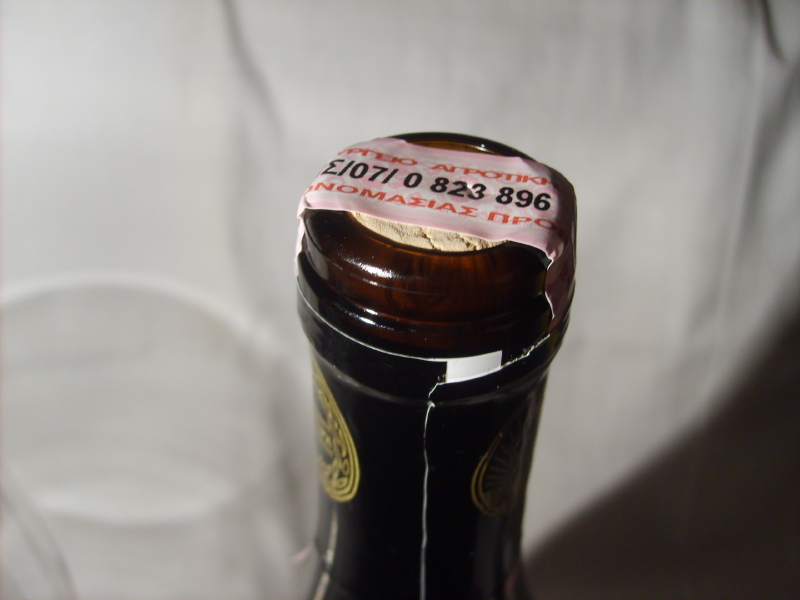 Banderole "Onomasia prolefseos anoteras piotitas" (Ονομασία προελευσέως ανωτέρας ποιοτήτας) auf griechischem Weinverschluss